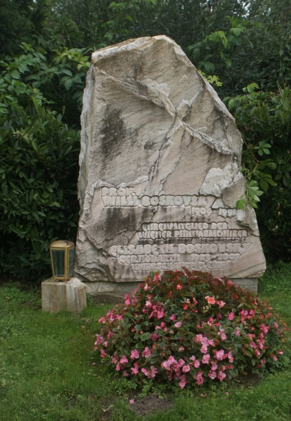 Wiener Zentralfriedhof-Willi Boskovsky